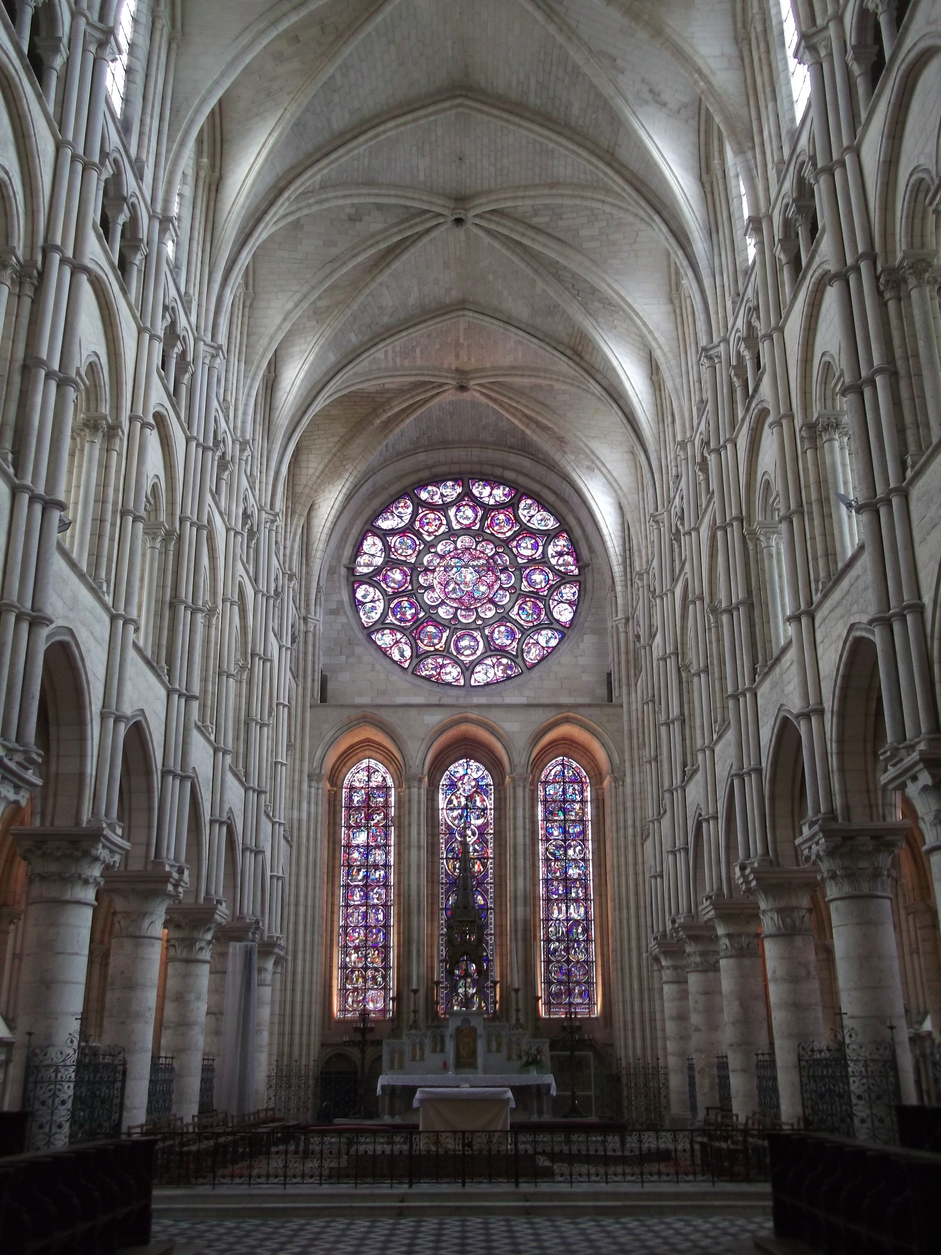 Cathédrale Notre-Dame (ClasséClassé) .